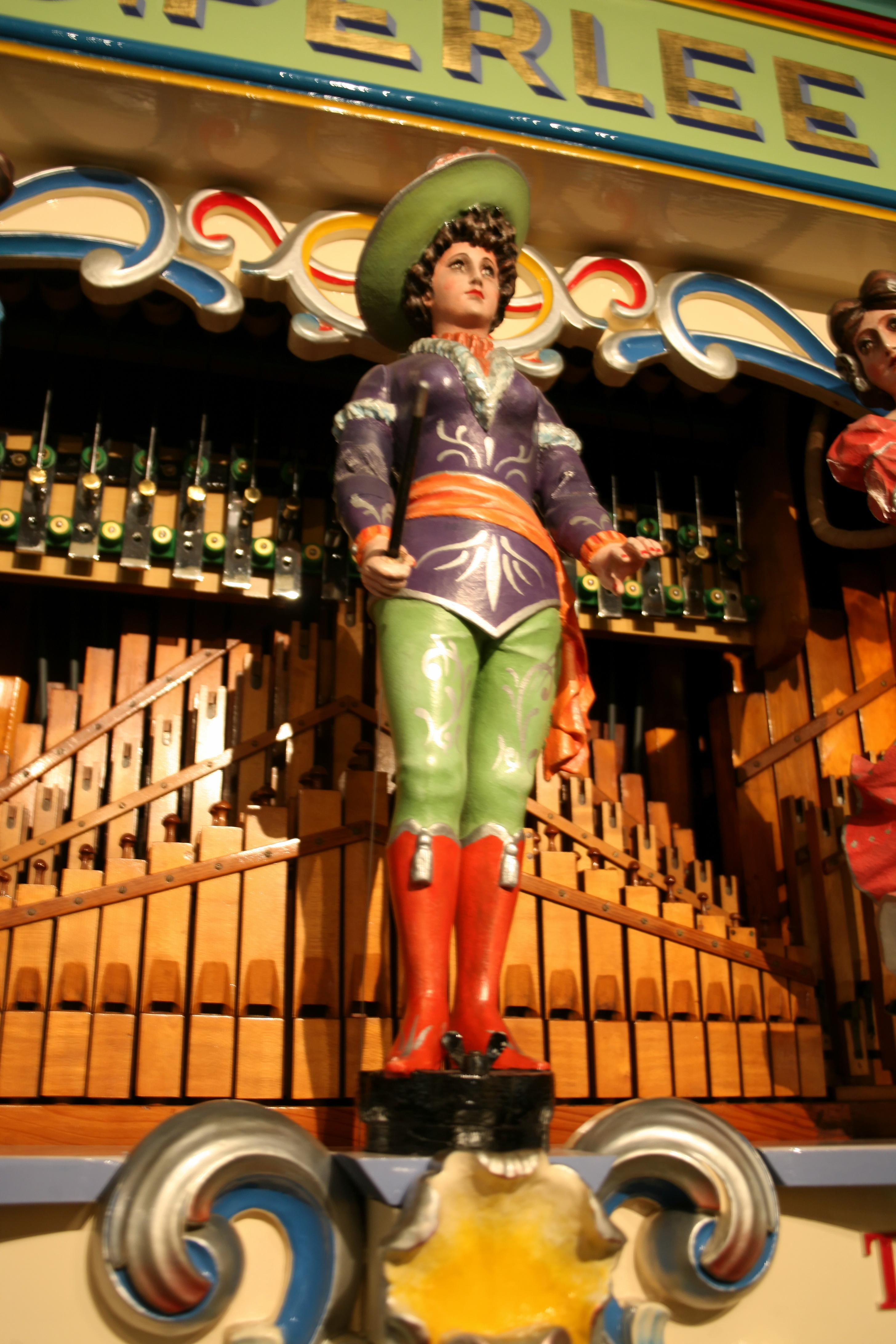 museum speelklok tot pierement (225)